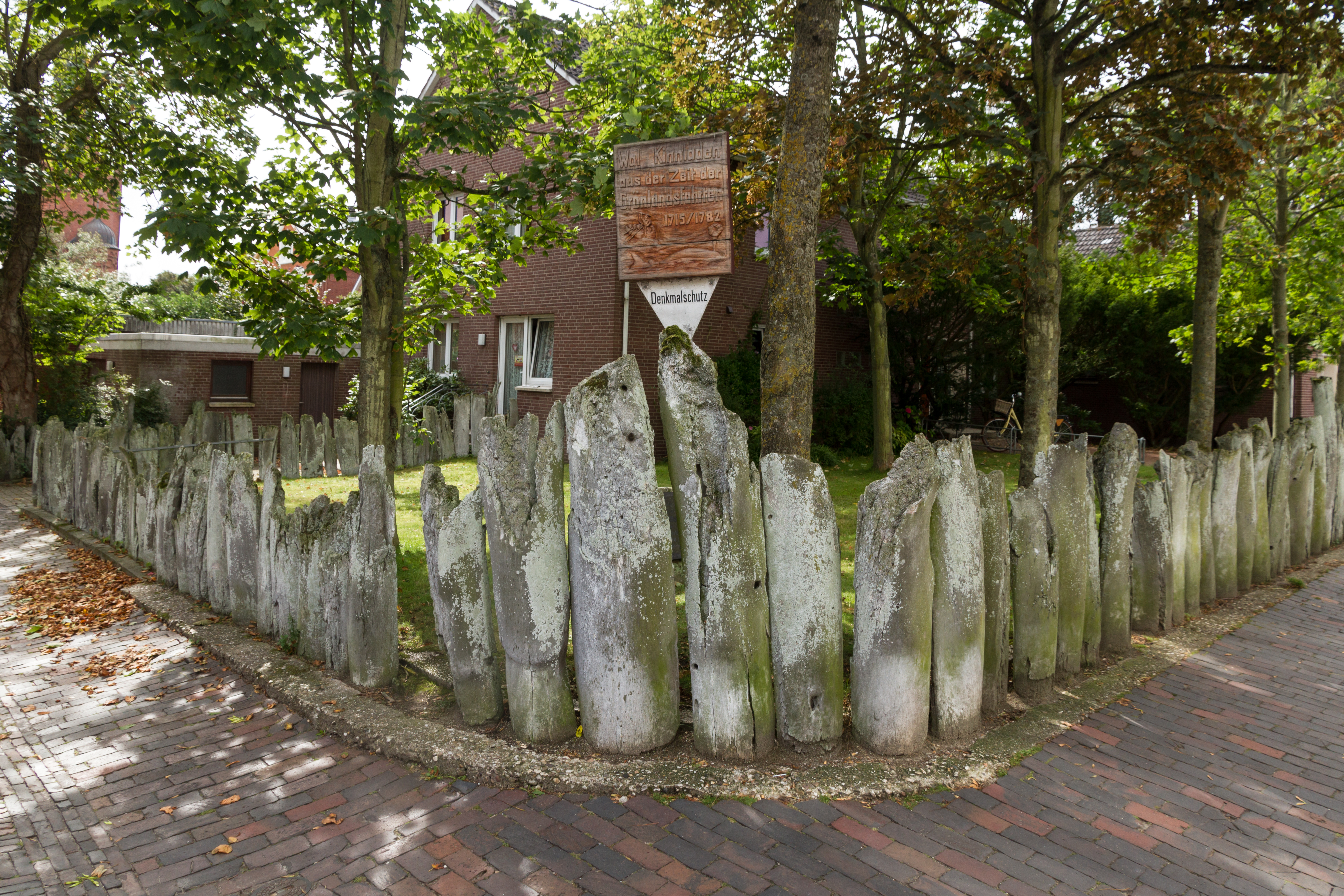 Borkum Walknochenzaun